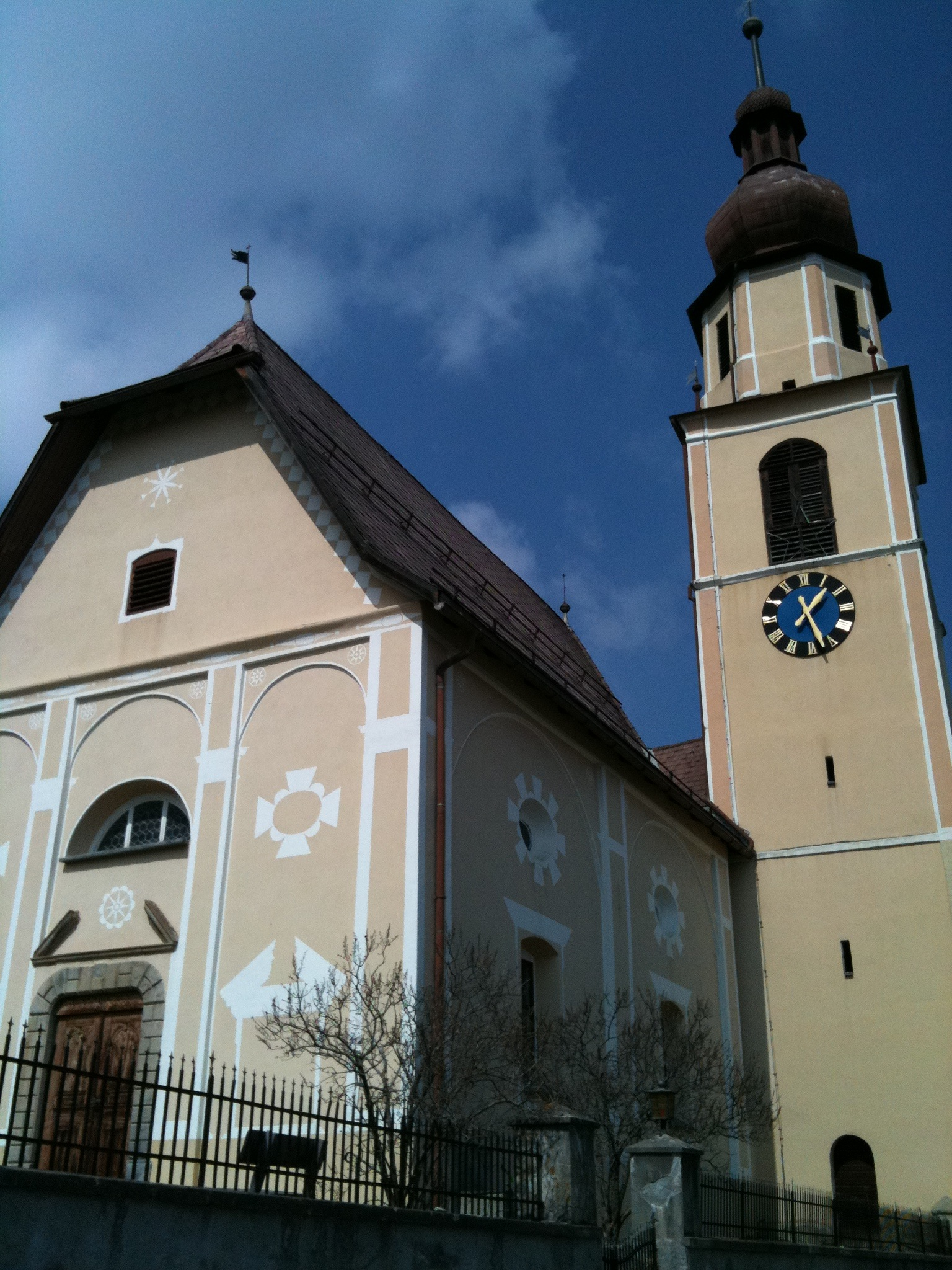 reformierte Kirche Sarn, Kanton Graubünden